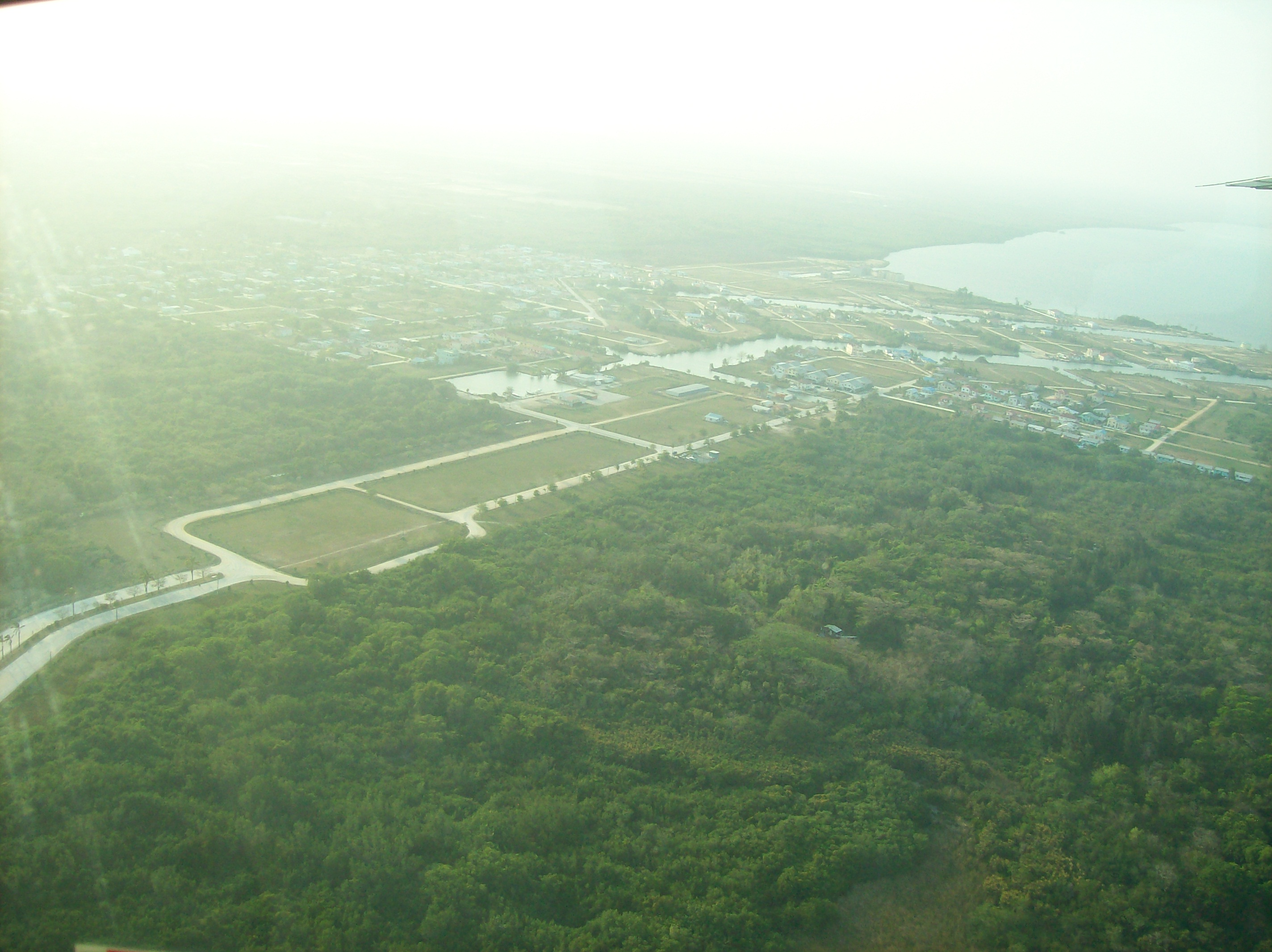 Ladyville